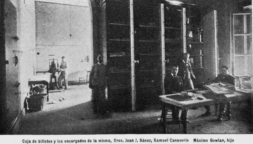 El sr, Canaveris (centro) durante su jornada de trabajo en La Casa de la Moneda (Provincia de Buenos Aires)